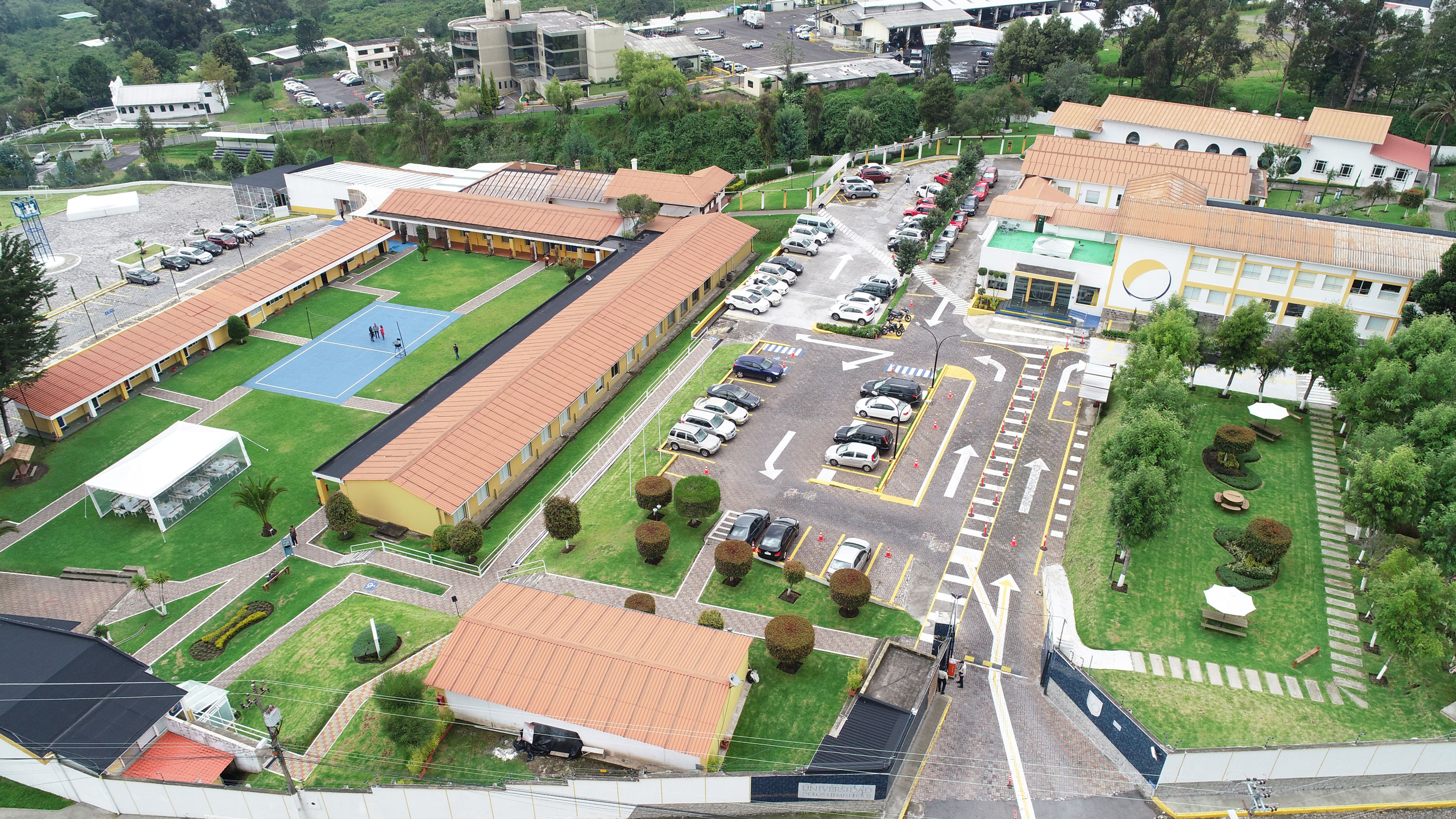 Universidad de Los Hemisferios